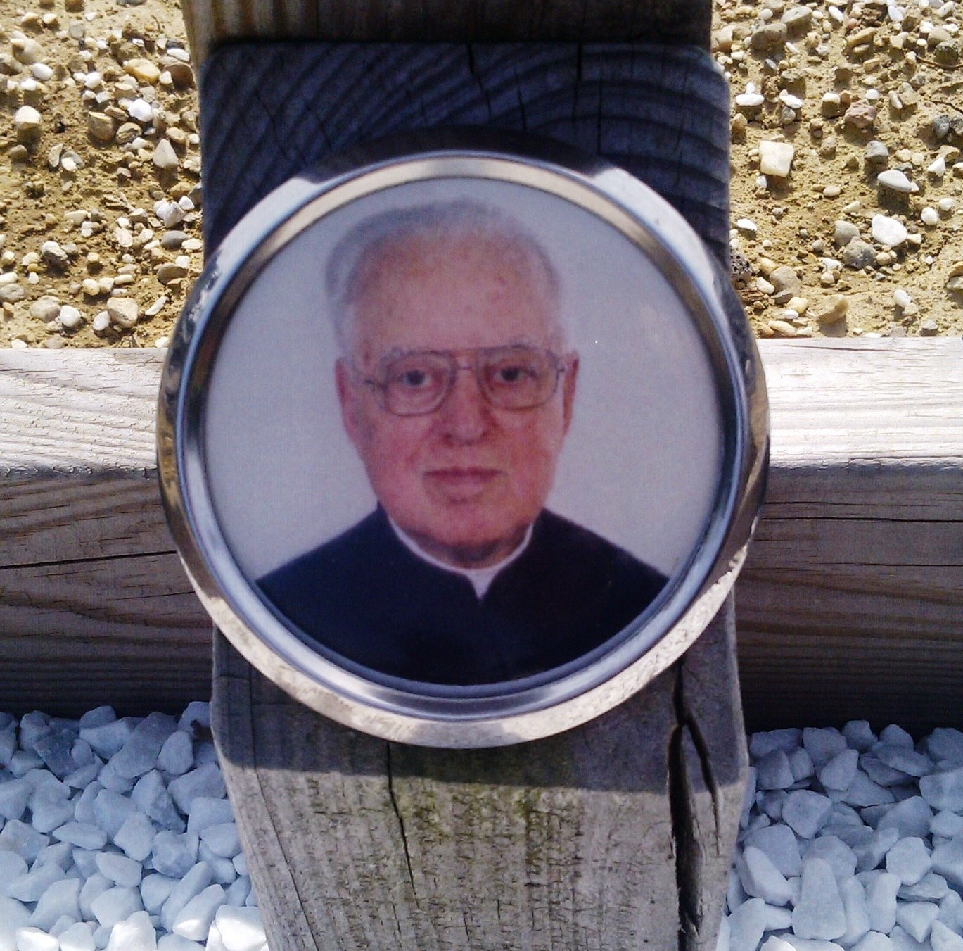 Padre Roberto Busa SJ - tomba . CImitero di Crenna (Gallarate, Italia) - dettaglio